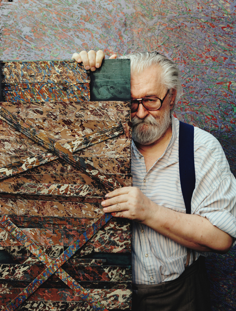 Jaroslav Vožniak (2003), foto Vladislav Krédl